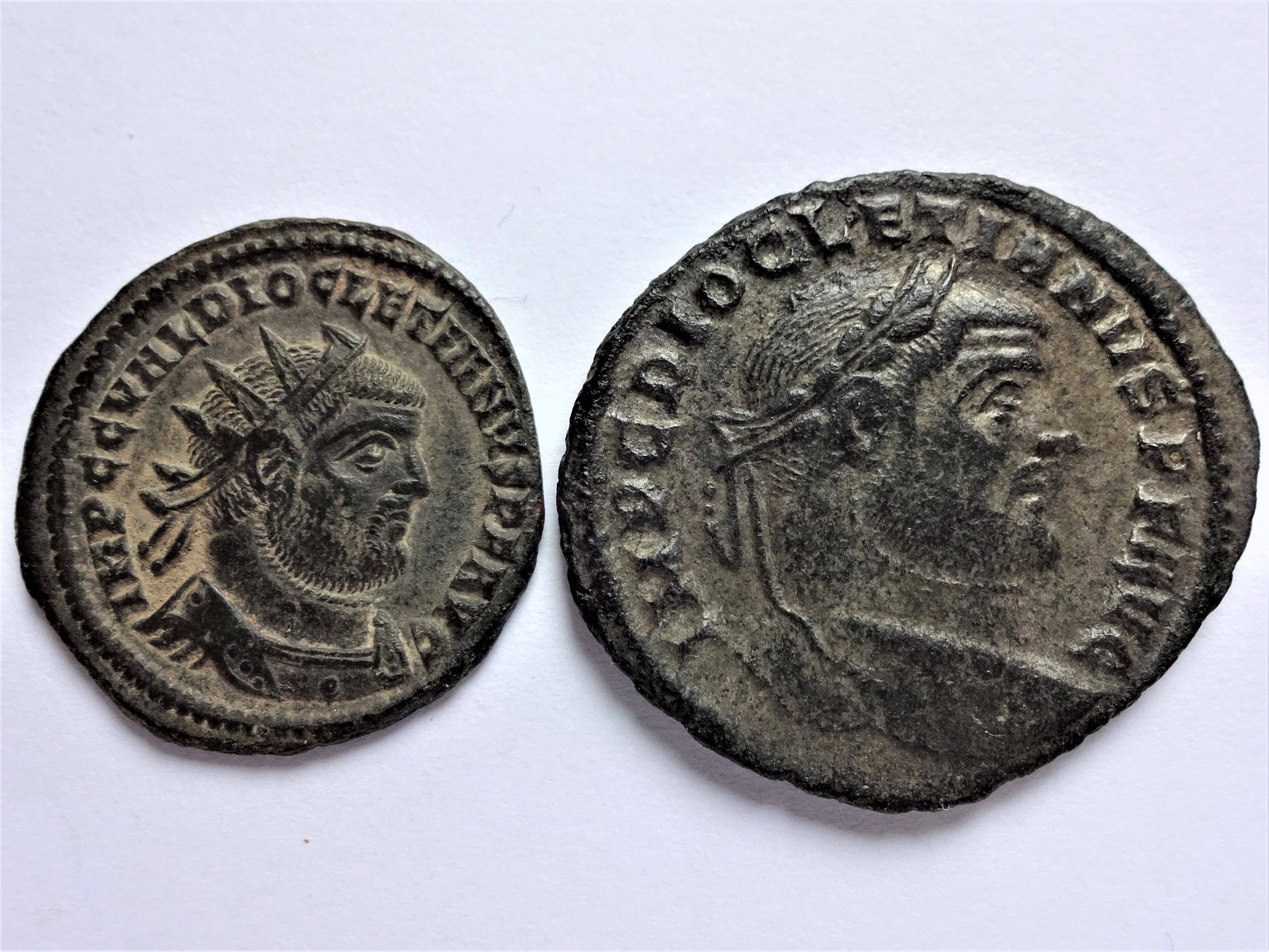 Münzen Diokletians, links vor und rechts nach der Reform